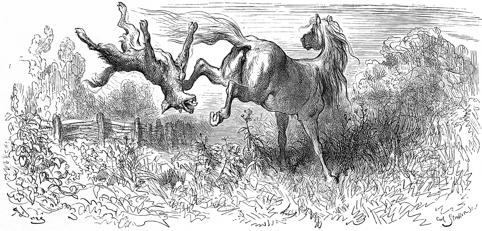 grafika z książki PL Bajki, Jean de La Fontaine, nakładem i drukiem Jana Noskowskiego, Warszawa 1876